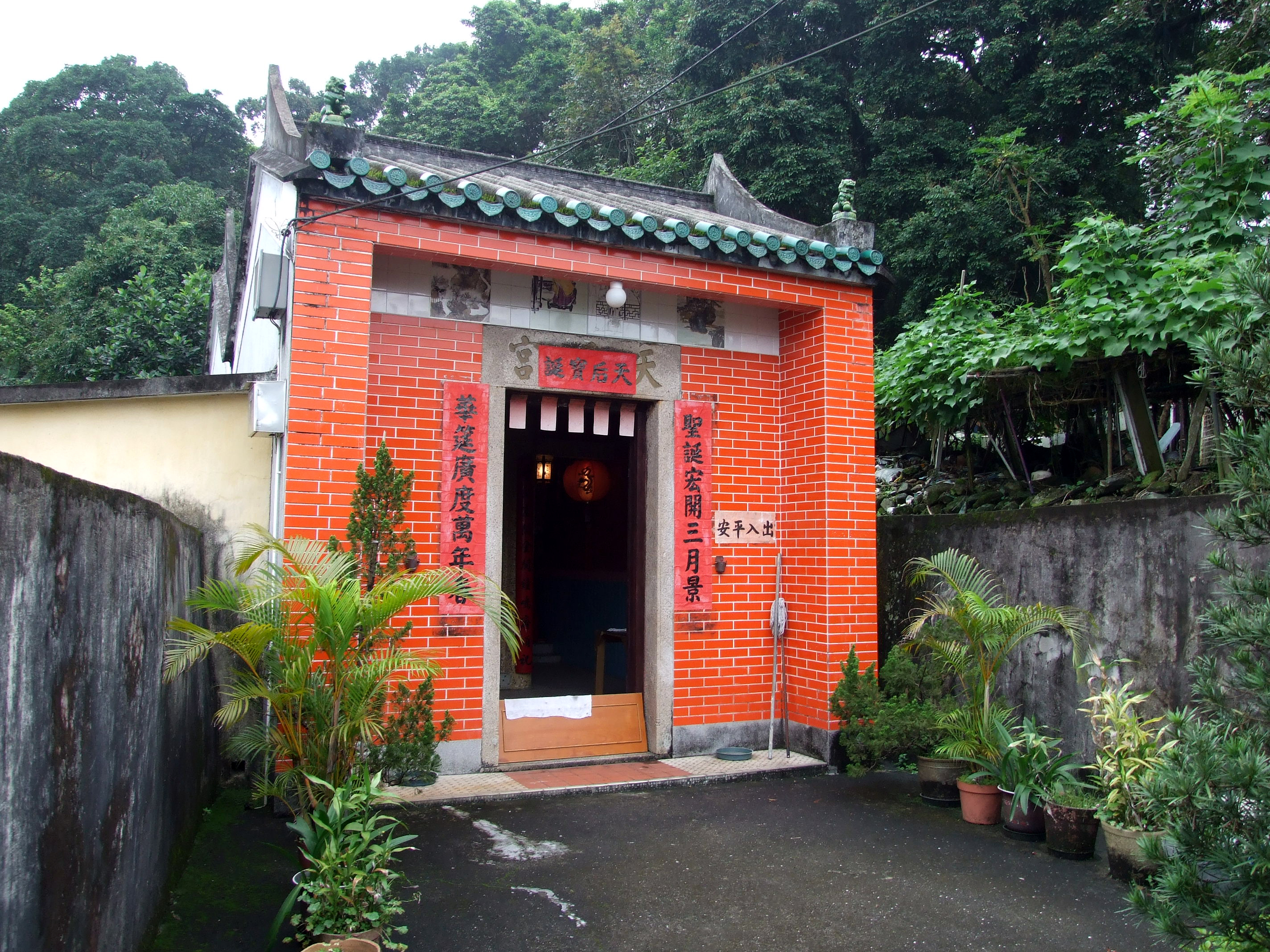 中文（香港）: 北港天后宮